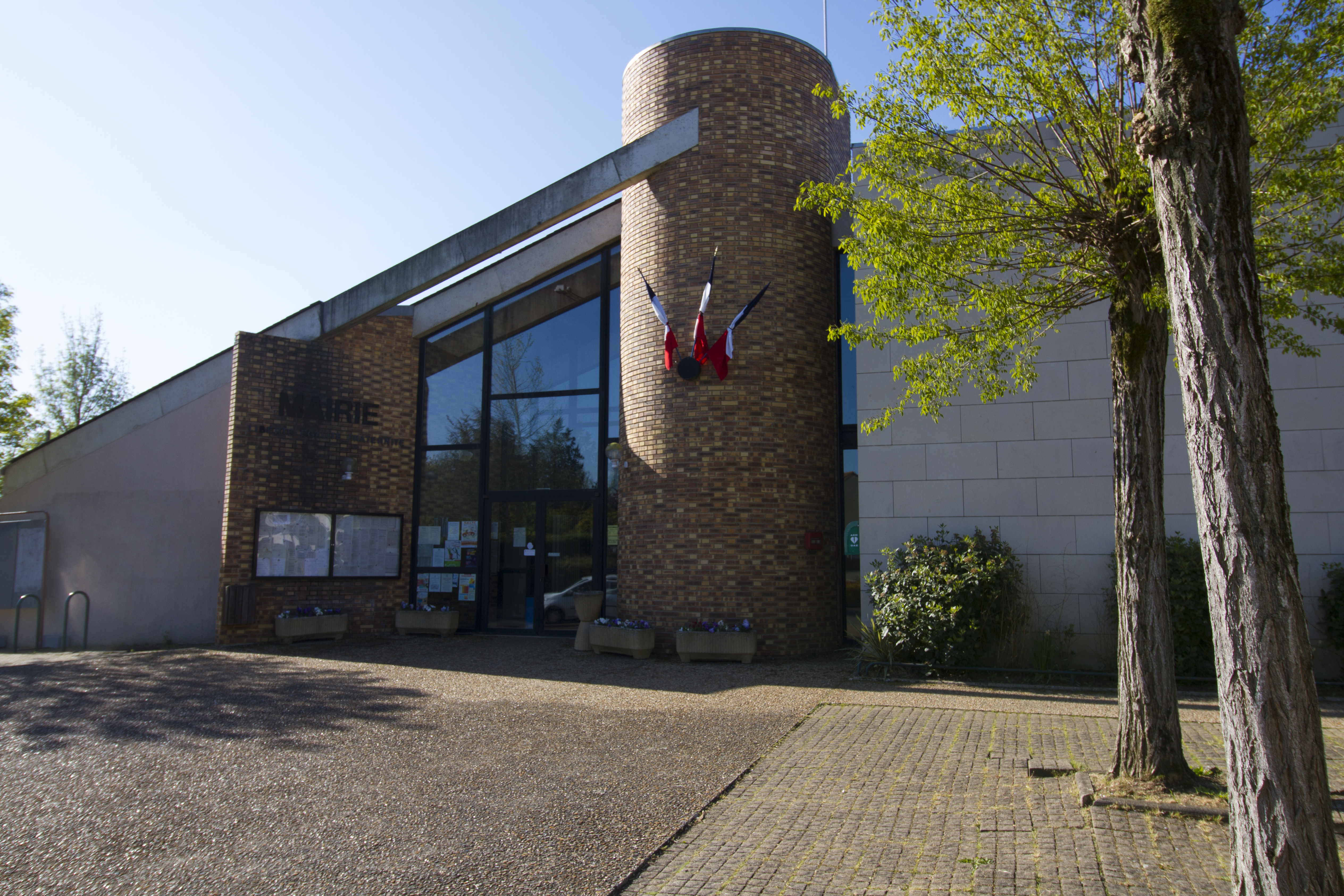 Mairie d'Etival